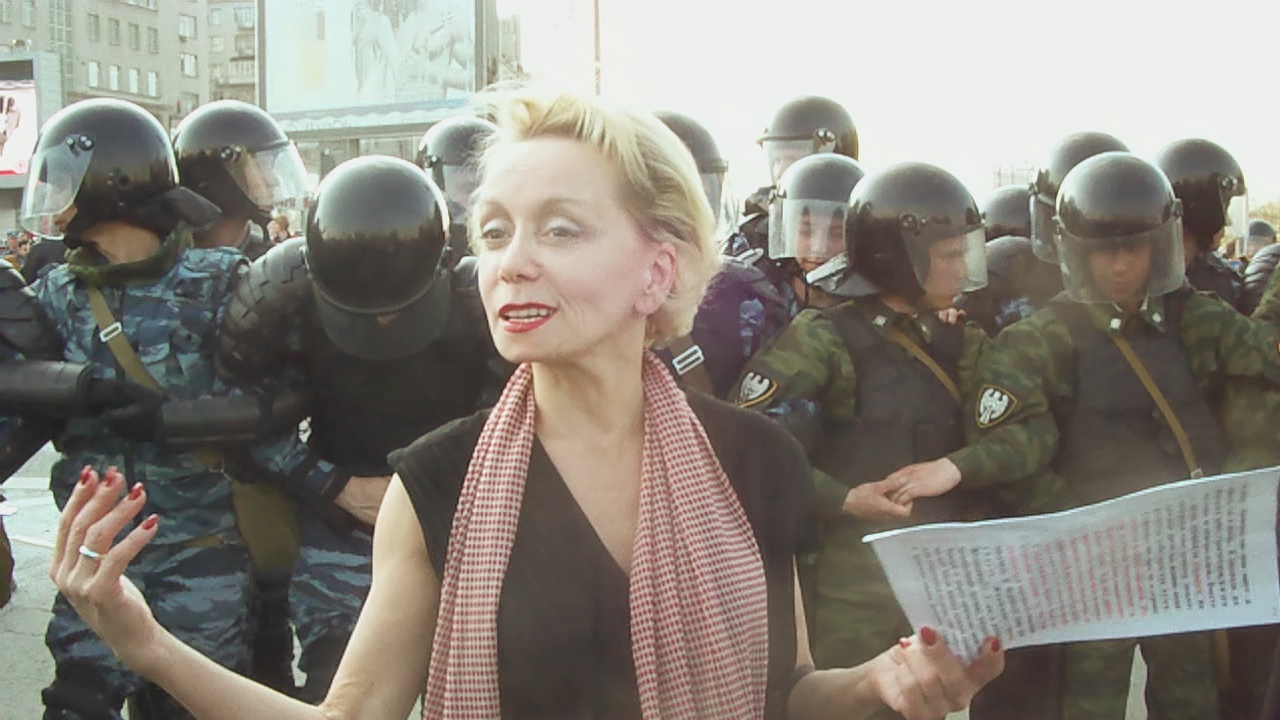 Евдокия Германова